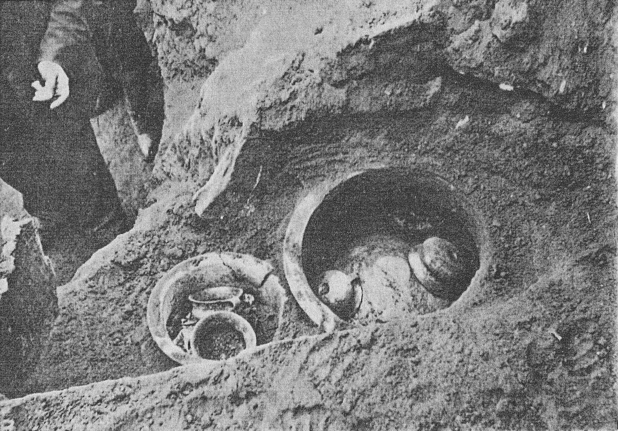 Urnen in situ